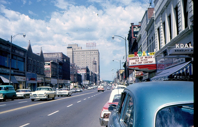 Rue Superior à Duluth - 1.09.1964.